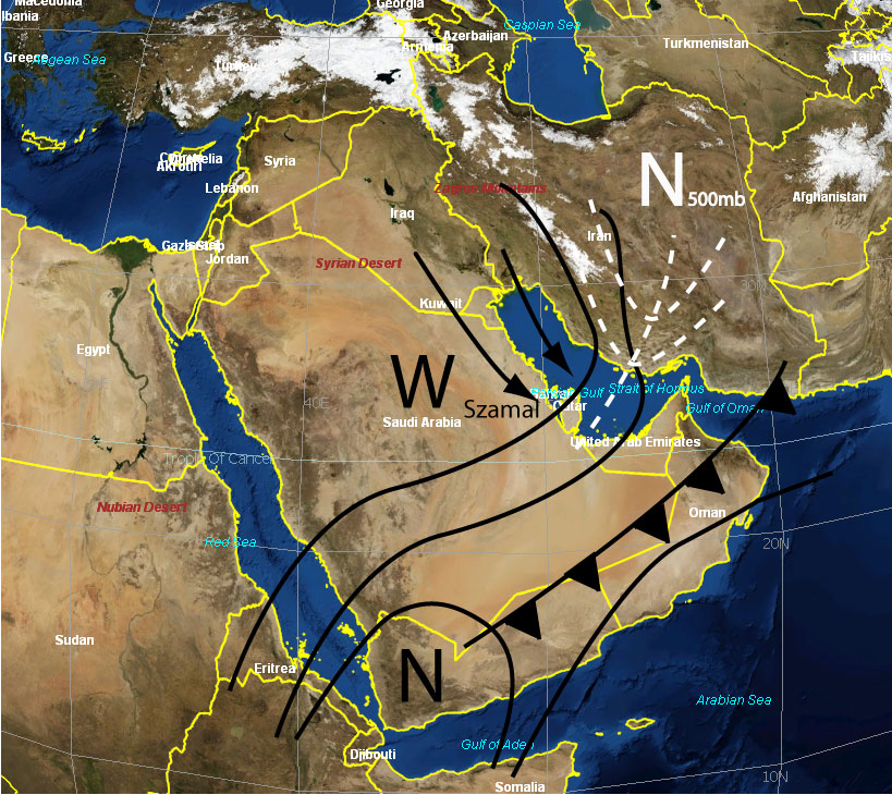 Zimowa cyrkulacja prowadząca do wiatru szamal w Zatoce Perskiej. Na rysunku wykorzystano fragment mapy (screenshot) z programu NASA Worldwind. Sytuacja synoptyczna jest zilustrowana na podstawie artykułu: Ali Hamid Ali, Wind regime of the Arabian Gulf, w książce The Gulf War and the Environment, edytorzy Farouk El-Baz, R. M. Makharita, Taylor & Francis, 1994 ISBN 2881246494, 9782881246494, 206 stron.